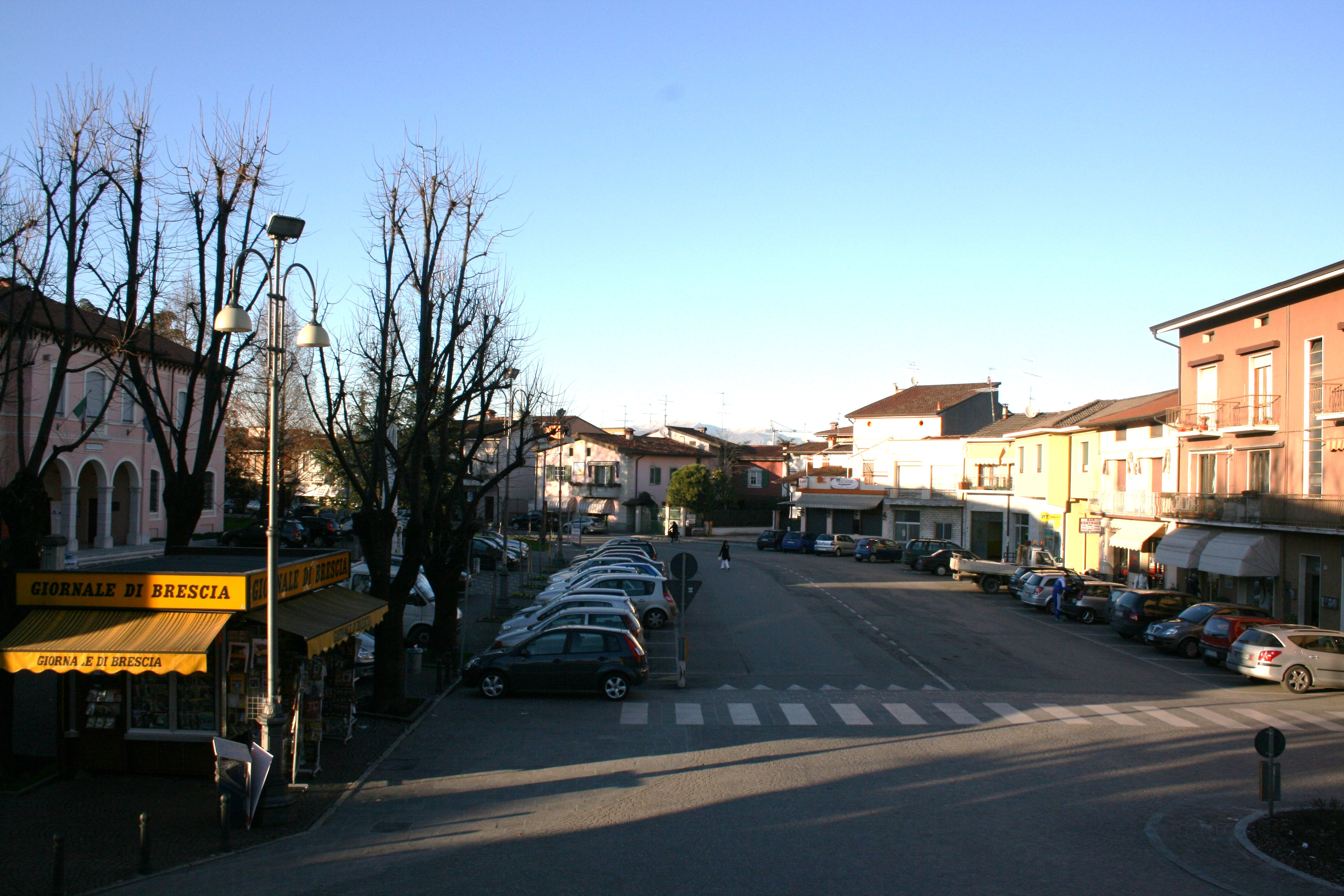 Piazza Flero